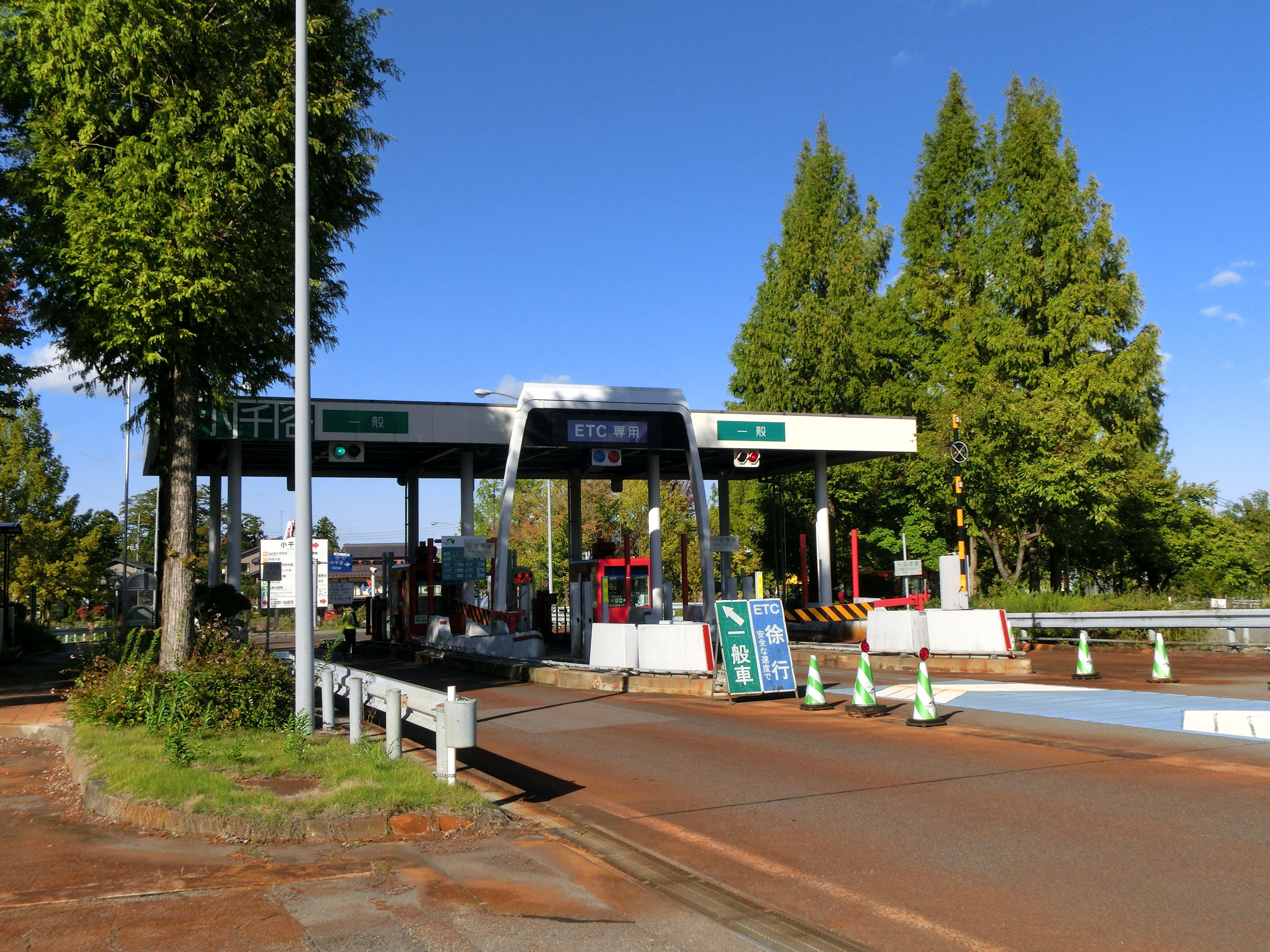 関越自動車道 小千谷インターチェンジ（料金所付近）